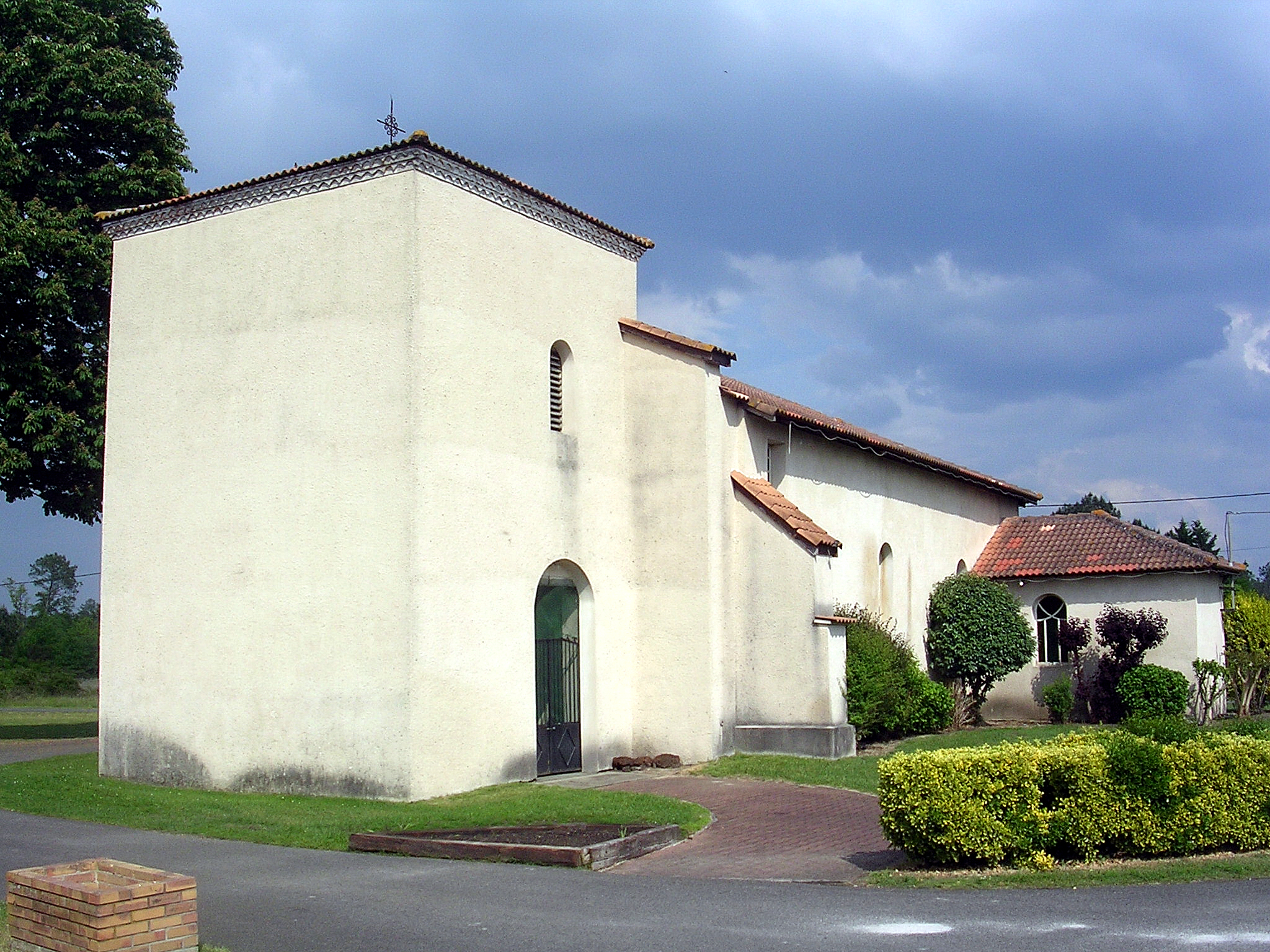 Eglise Sainte-Quitterie à Gastes, dans le département français des Landes